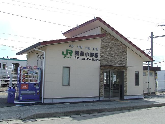 JR仙石線陸前小野駅新駅舎